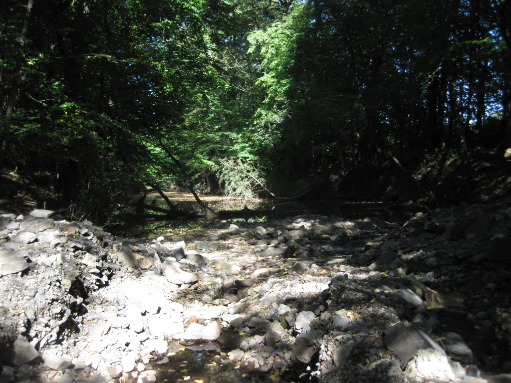 Fotografie z přírodní rezervace Rezavka.